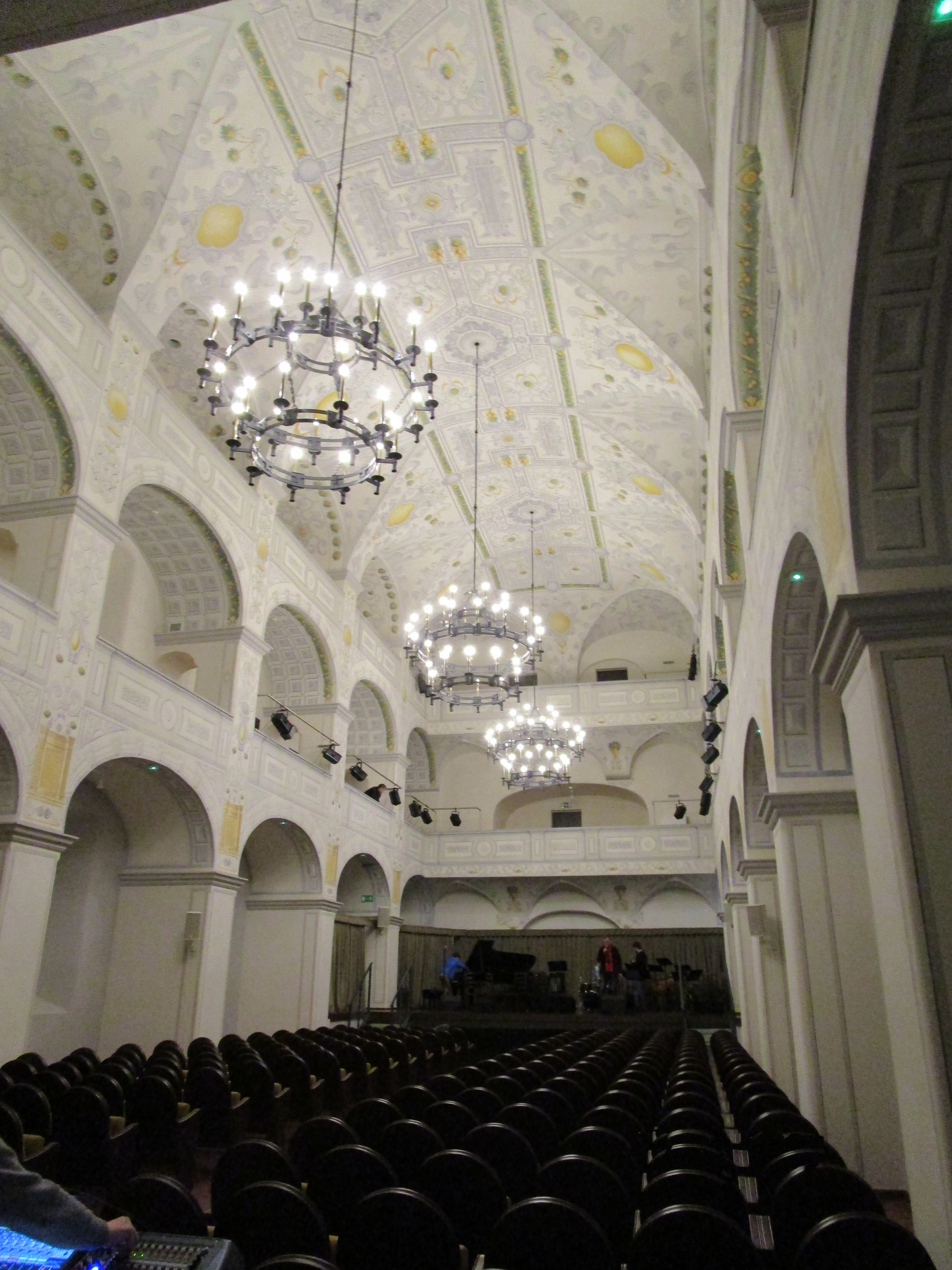 Ehemalige Schlosskirche - jetzt Bogislawsaal